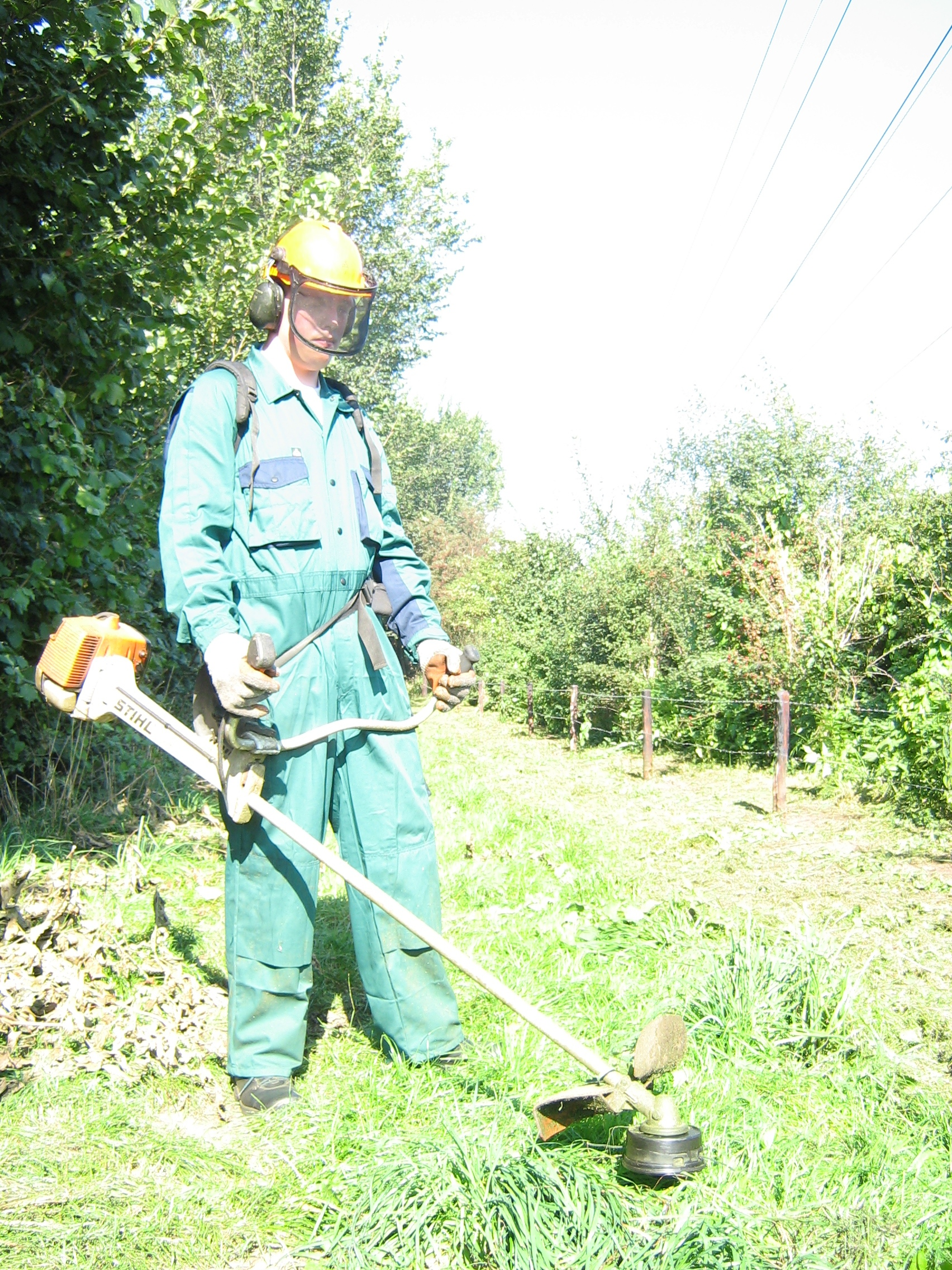 Stihl bosmaaier en veiligheidskleding